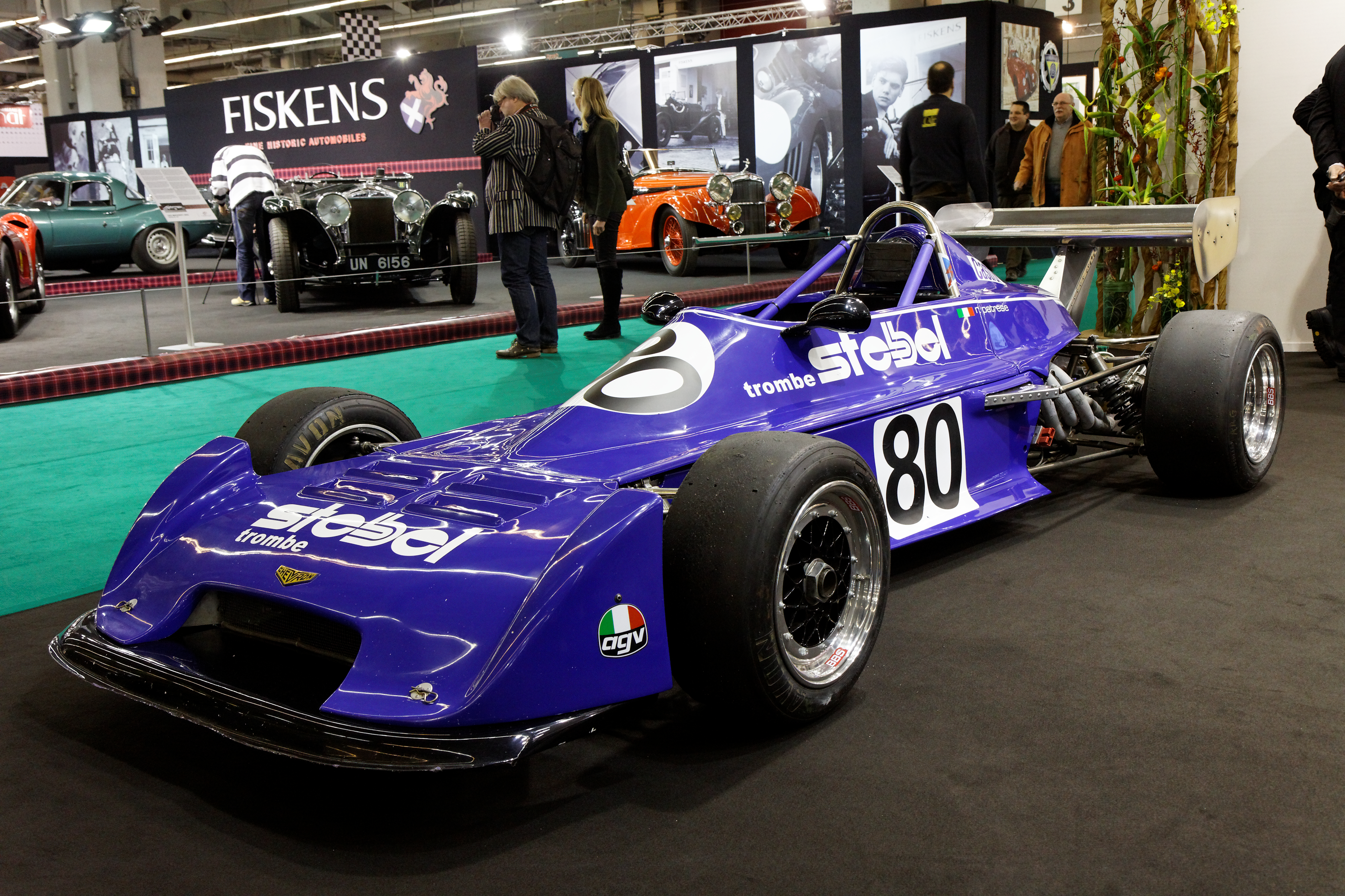 Photographie prise lors du salon rétromobile 2011 à Paris, porte de Versailles.